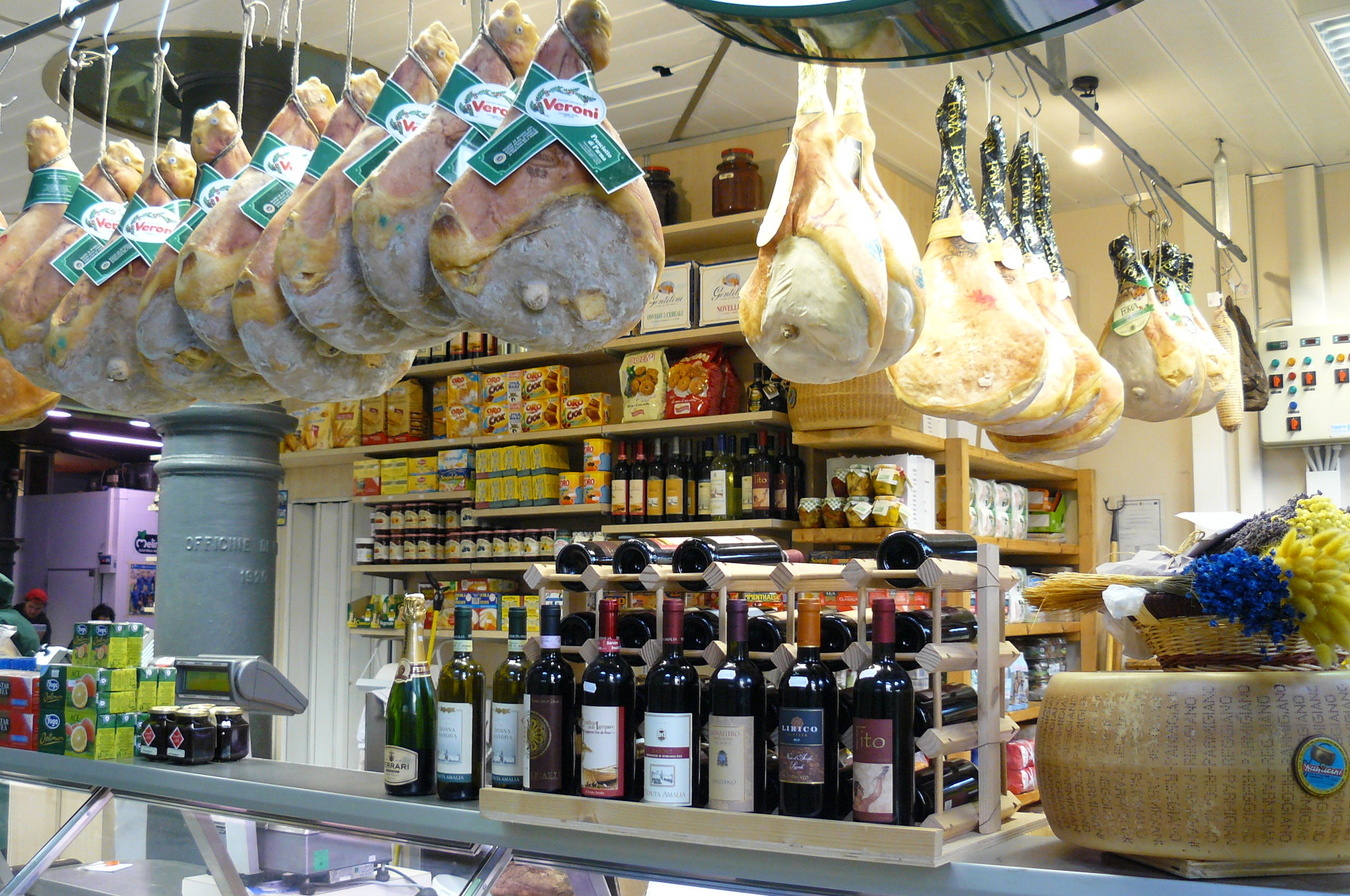 Sklep spożywczy w Rawennie.